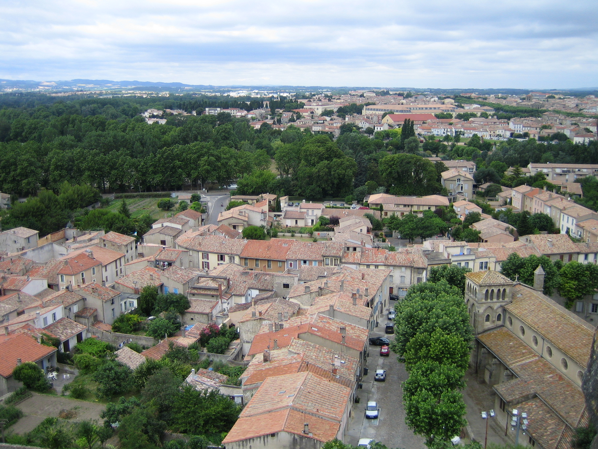 (2005-07-06T10-52-05_carcassonne.jpg)